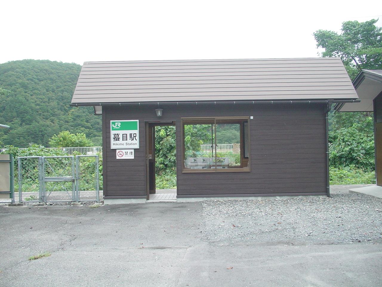 （蟇目駅）